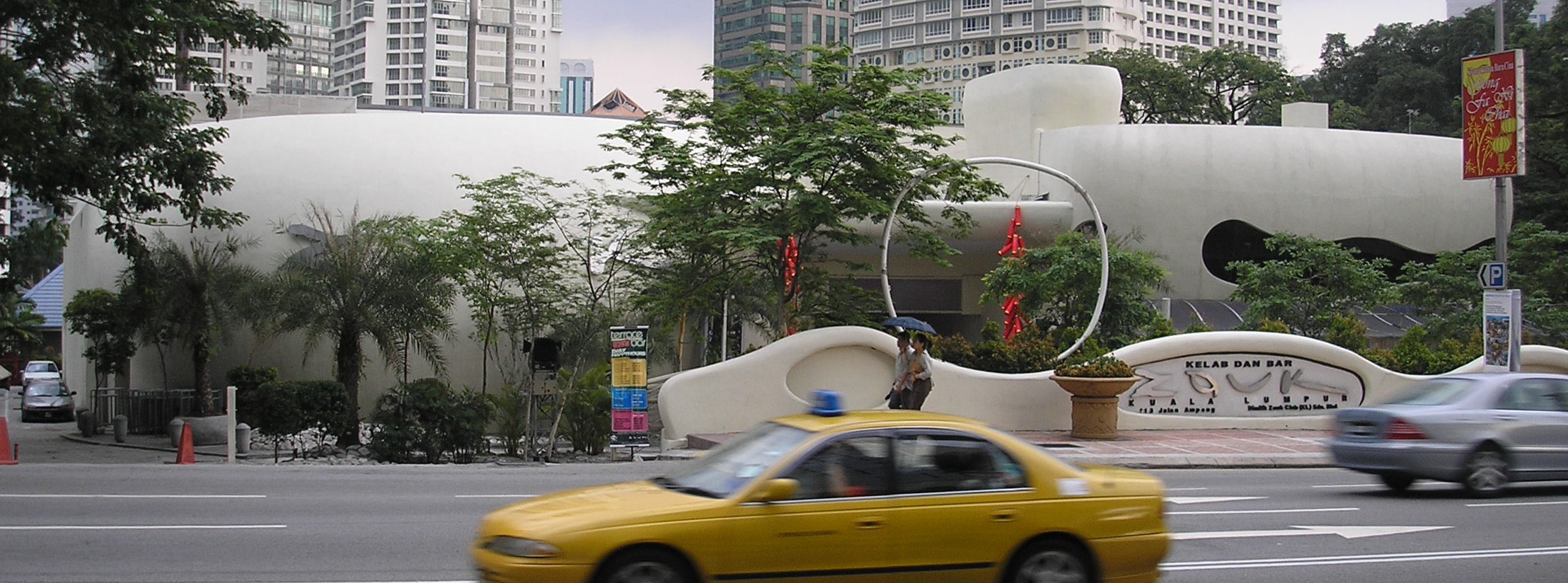 Zouk, as seen from Ampang Road (Jalan Ampang), Kuala Lumpur, Malaysia.